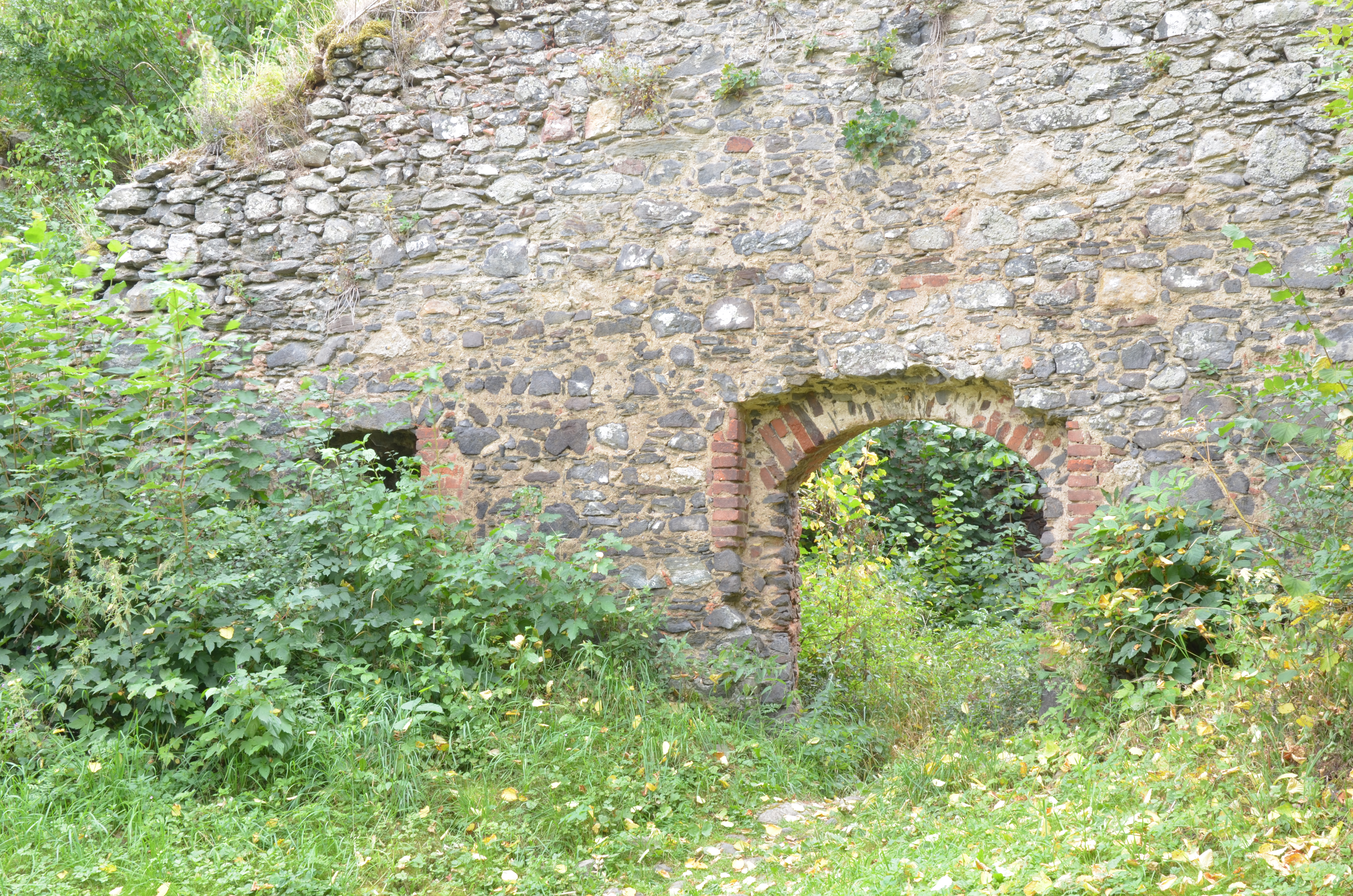 Hrad Krasíkov (Švamberk) s kostelem sv. Maří Magdaleny, zřícenina